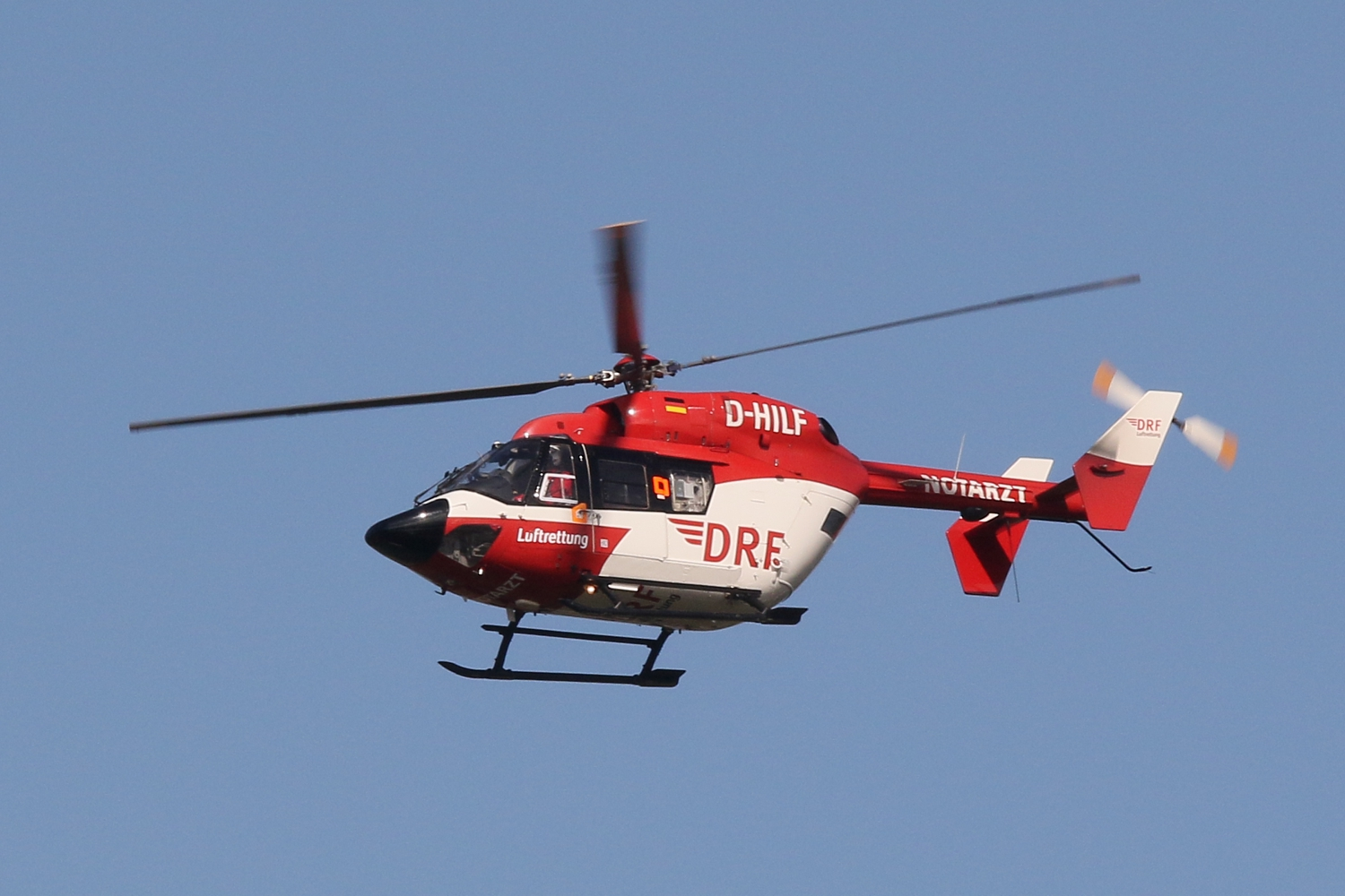 DRF-Rettungshubschrauber MBB/Kawasaki BK 117 in der Luft beim Einsatz